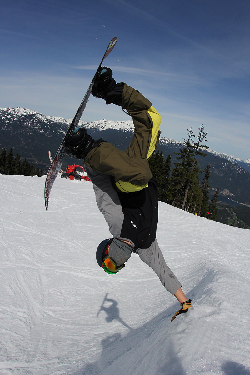 スノーボード フリースタイル・トリック